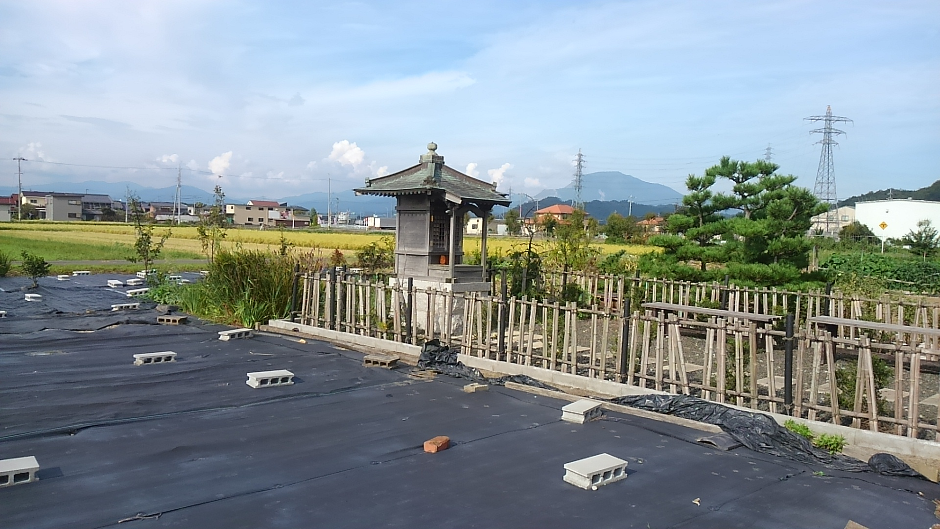 大谷吉継の首塚